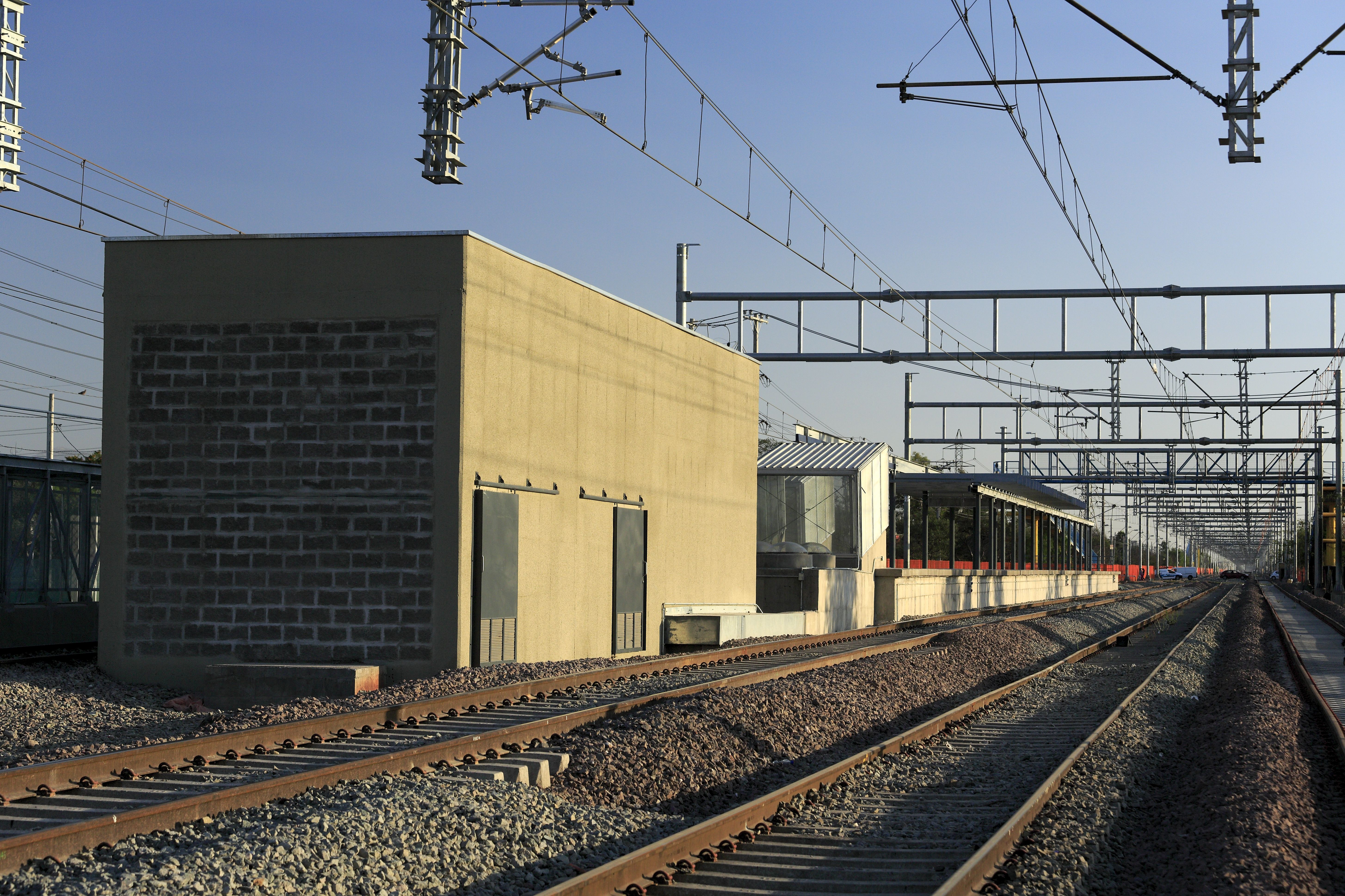 Die Anlagen des Haltepunktes sind im Rohbau fertiggestellt, eine Inbetriebnahme ist nicht absehbar. Vorgesehen ist eine Trennung von Regional- und Fernverkehr, die Planung ist erstaunlich großzügig. Von den vier hier liegenden Gleisen ist nur eins in Betrieb. Mehr ist beim derzeitigen Rumpfbetrieb auch nicht notwendig.